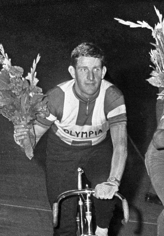 Nederlands Kampioenschap wielrennen Utrecht, ploegen achtervolging vier van Olympia kampioen, Theo Nikkessen